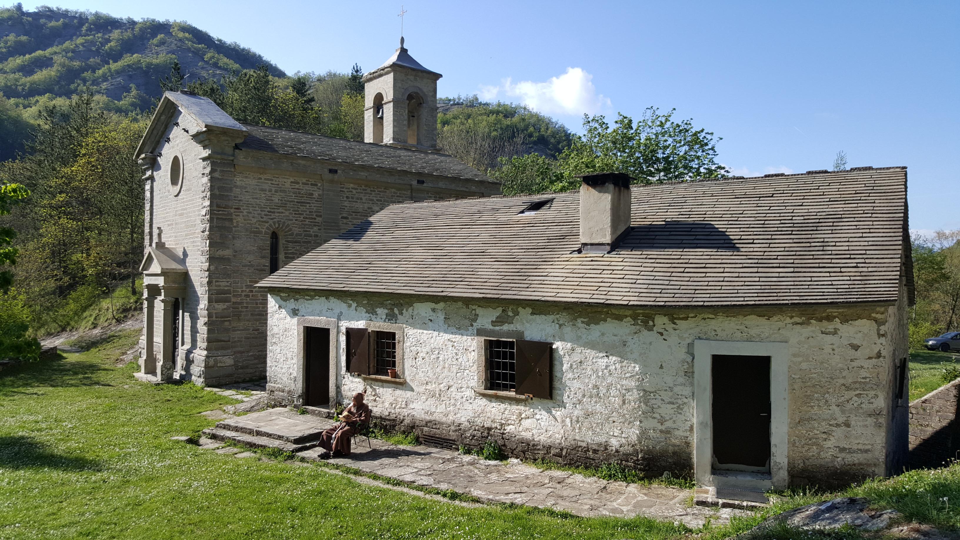 La Chiesa di Pietrapazza This is a photo of a monument which is part of cultural heritage of Italy.